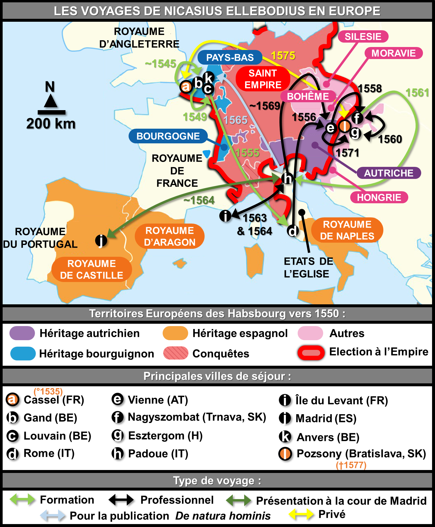 Voyages d'Ellebodius